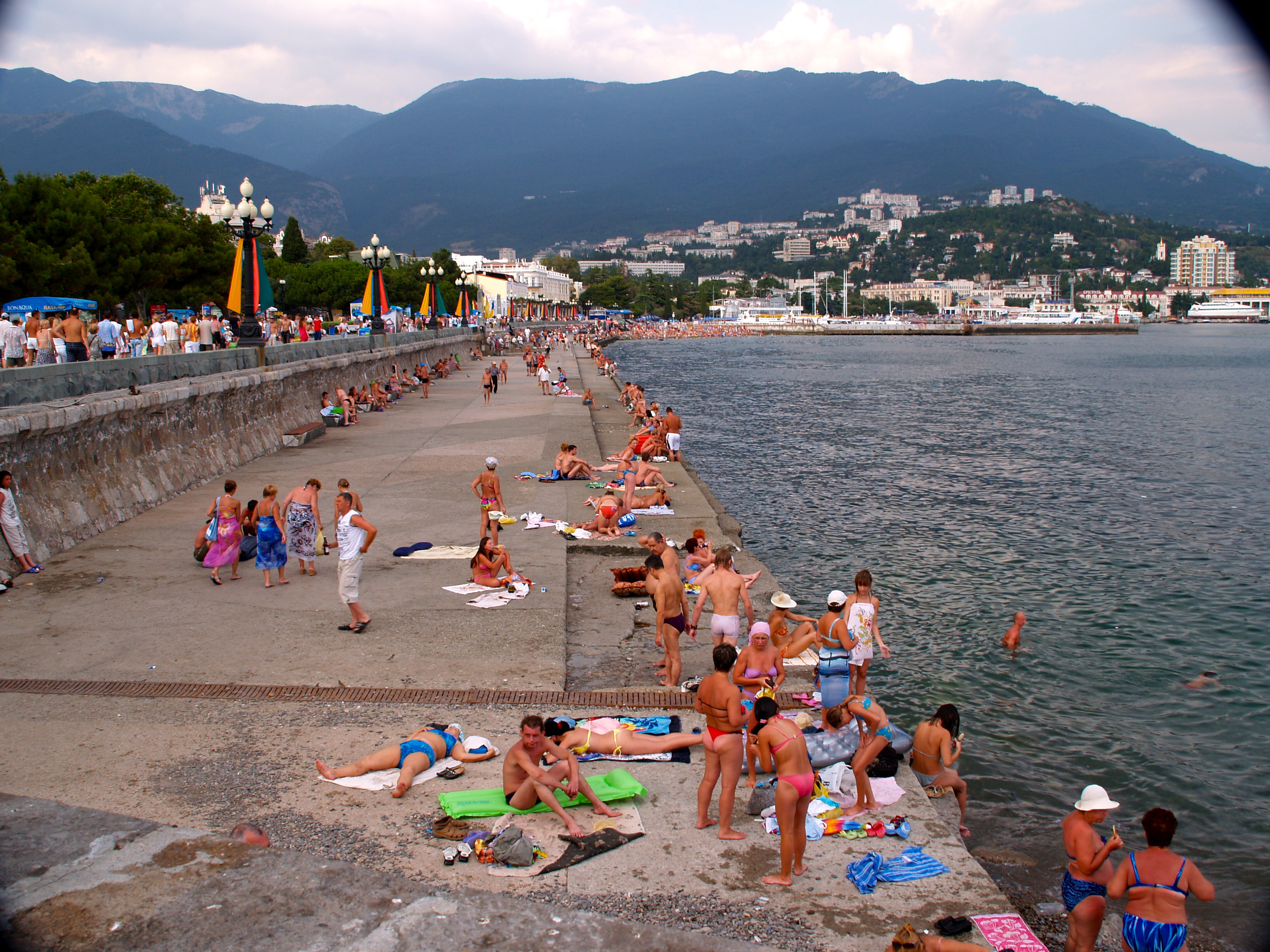 Boardwalk at Yalta Ukraine